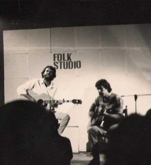 Tommy e Marco al Folk Studio nel 1983